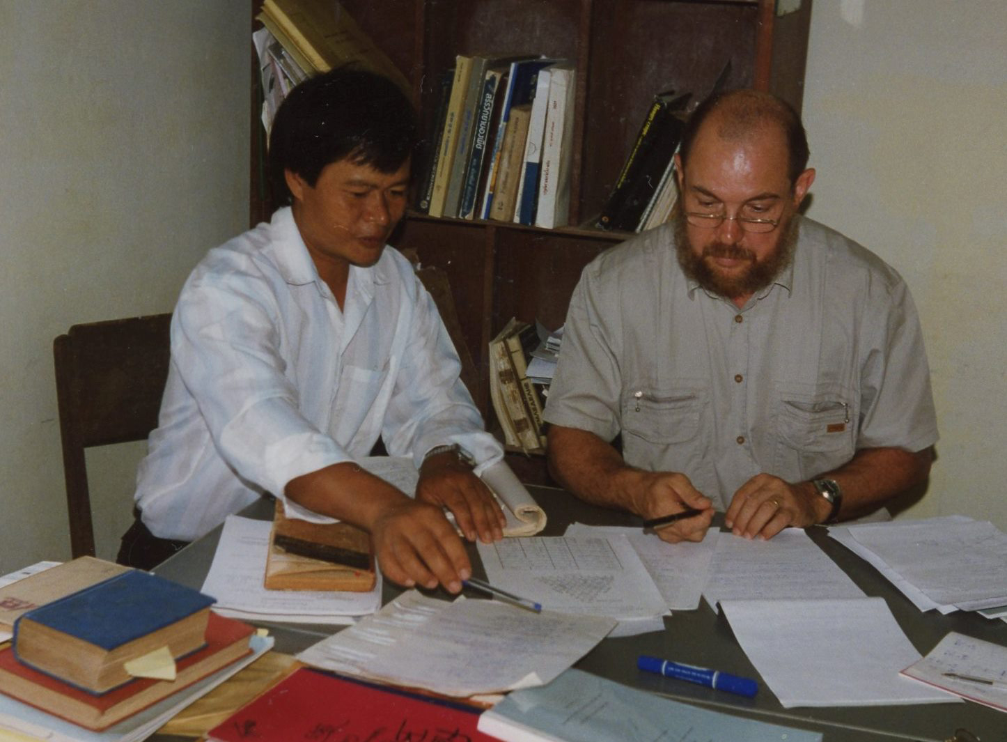 Nabong